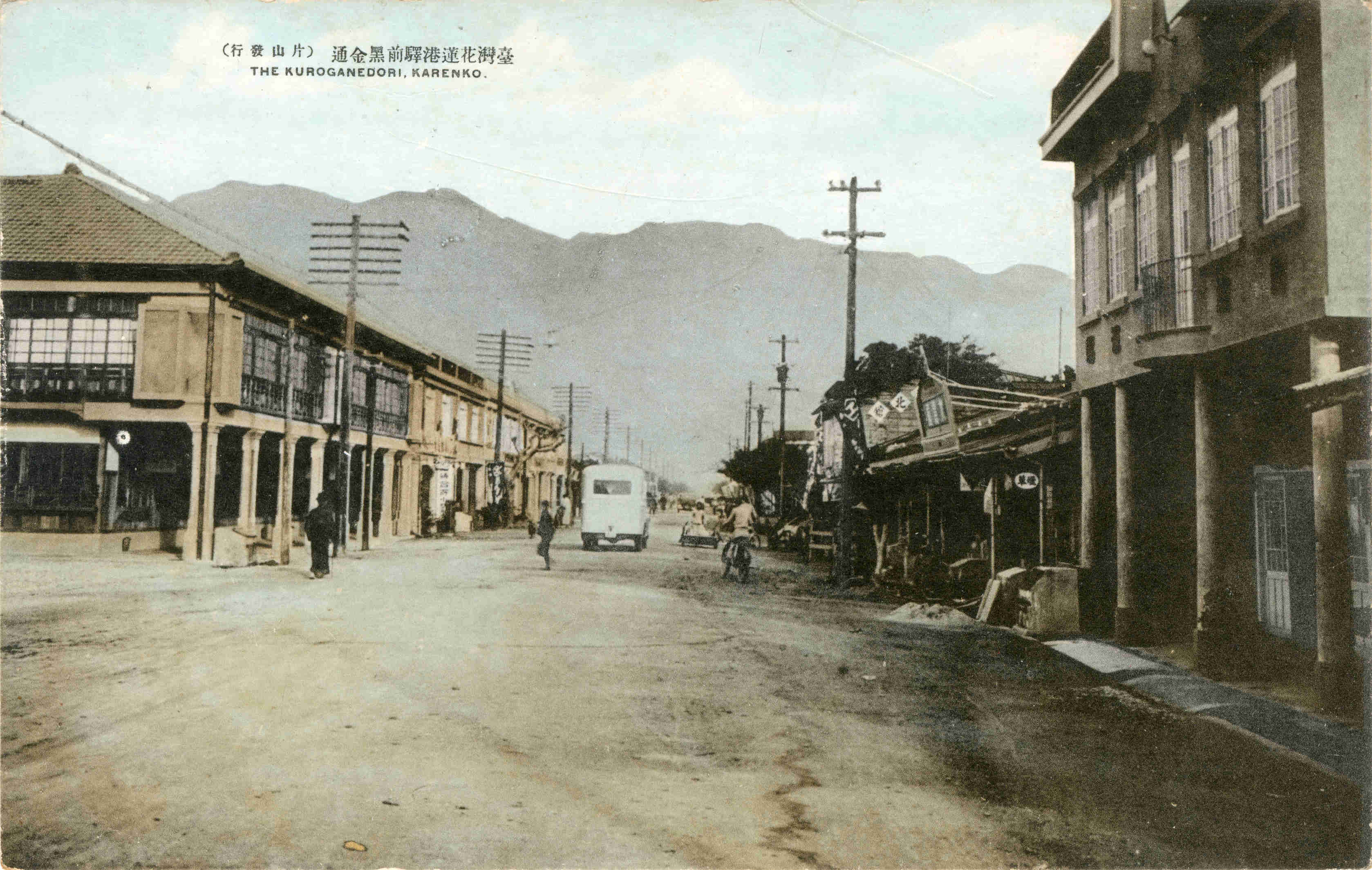 臺灣花蓮港驛前黑金通